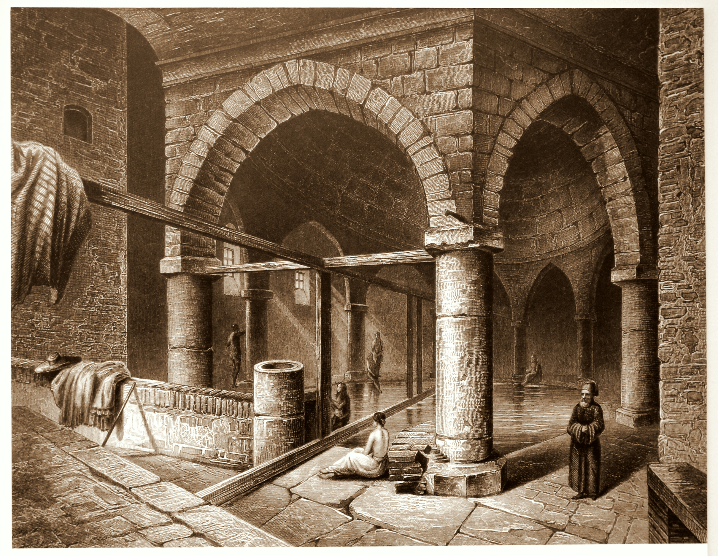 Rudas fürdő az 1850-es években. L. Rohbock